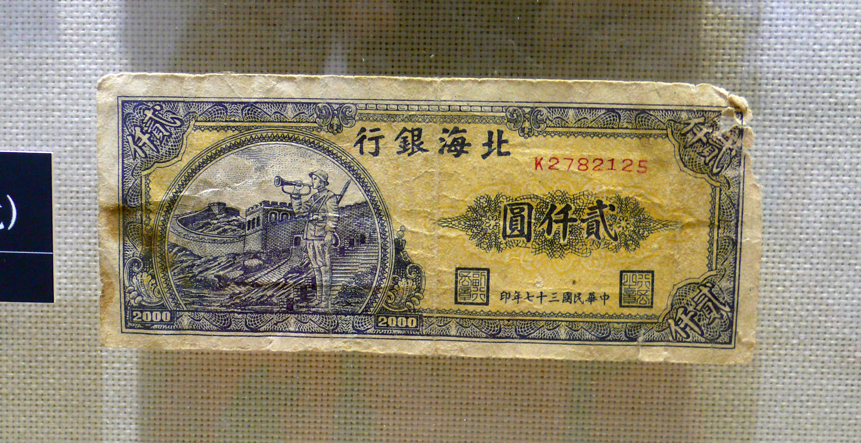 北海银行2000元纸币。中华民国三十七年印。青州博物馆藏。